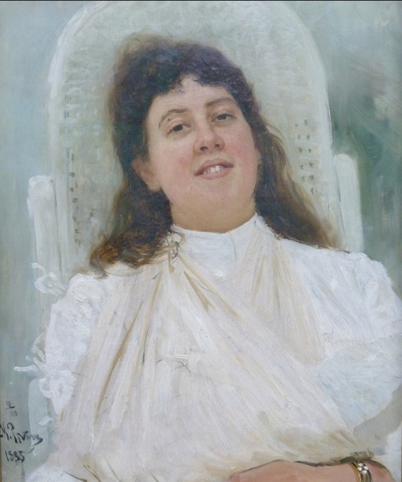 Der russische Maler Ilja Repin (1844-1930) malt seine Schülerin, die Malerin Marianne von Werefkin, mit einer Armschlinge nach einem Reitunfall